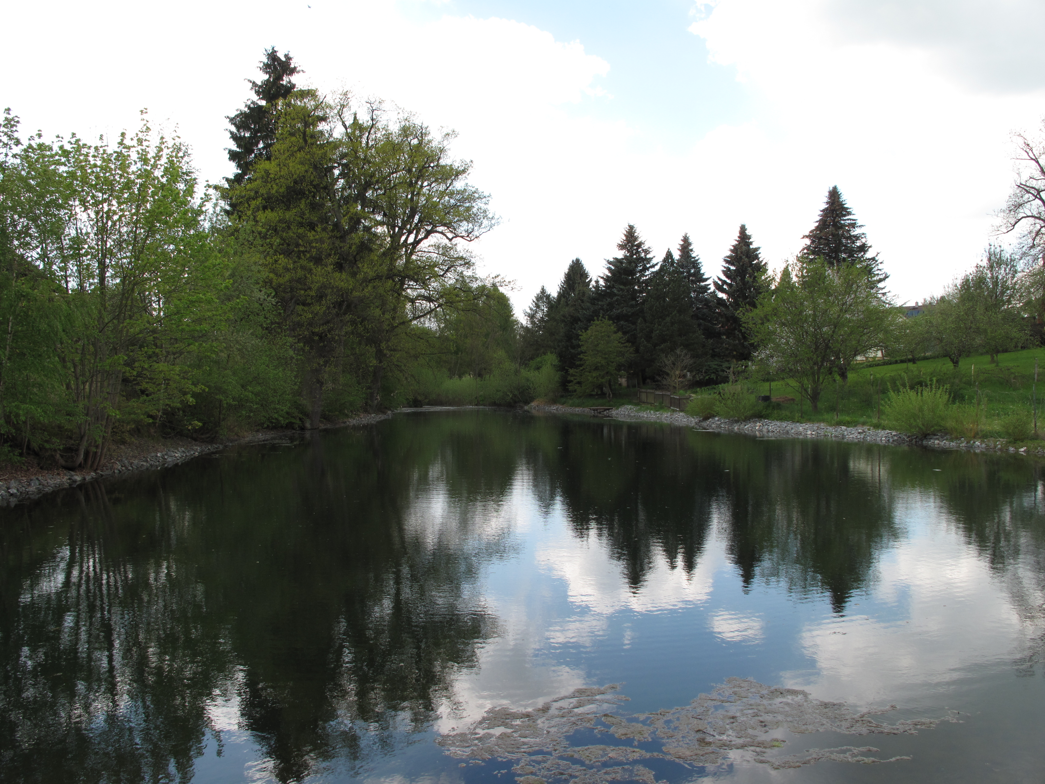 Rybník Zahradníček ve Velkých Popovicích. Okres Praha-východ, Česká republika.